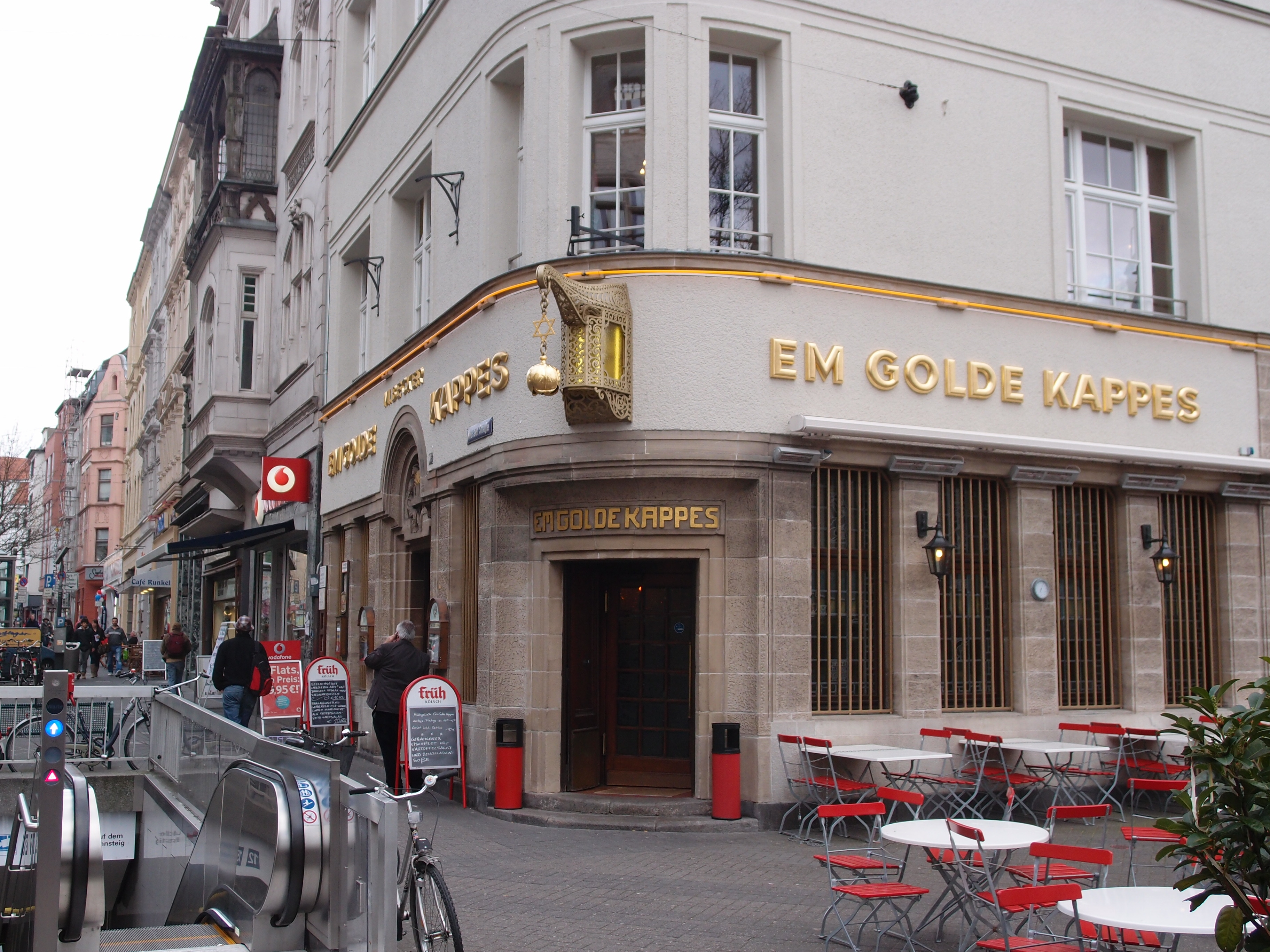 Brauhaus (Früh) "Em Golde Kappes" (in: Köln-Nippes) Datum: 30.03.2012 Urheber: M. Pfeiffer alias Gordito1869 Quelle: Privates Fotoarchiv des Urhebers